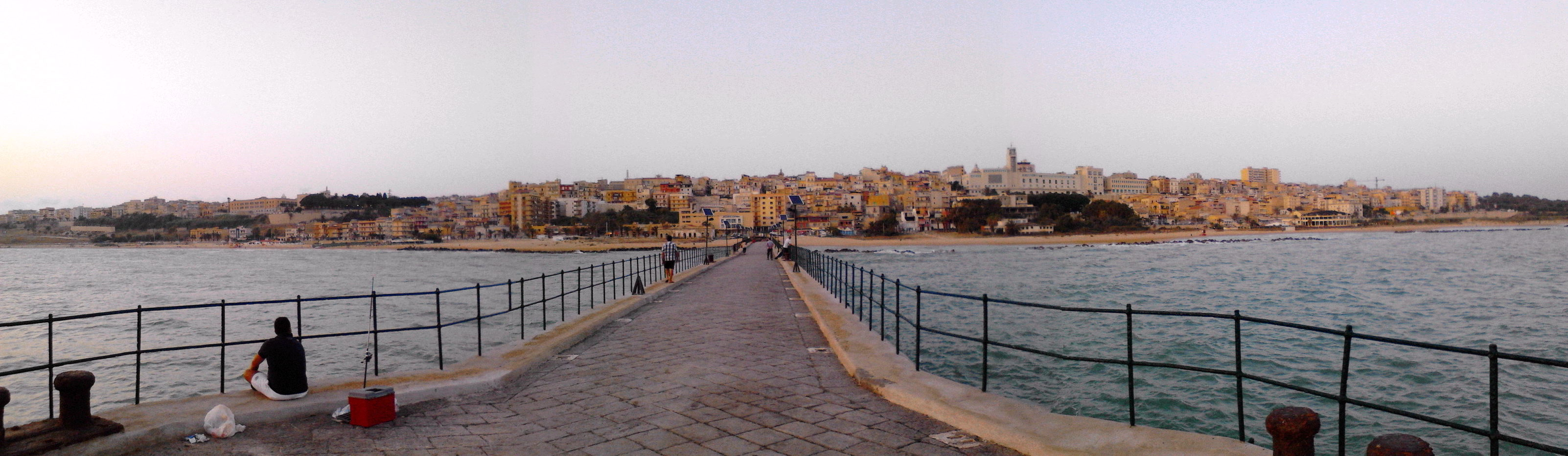 Gela dal pontile